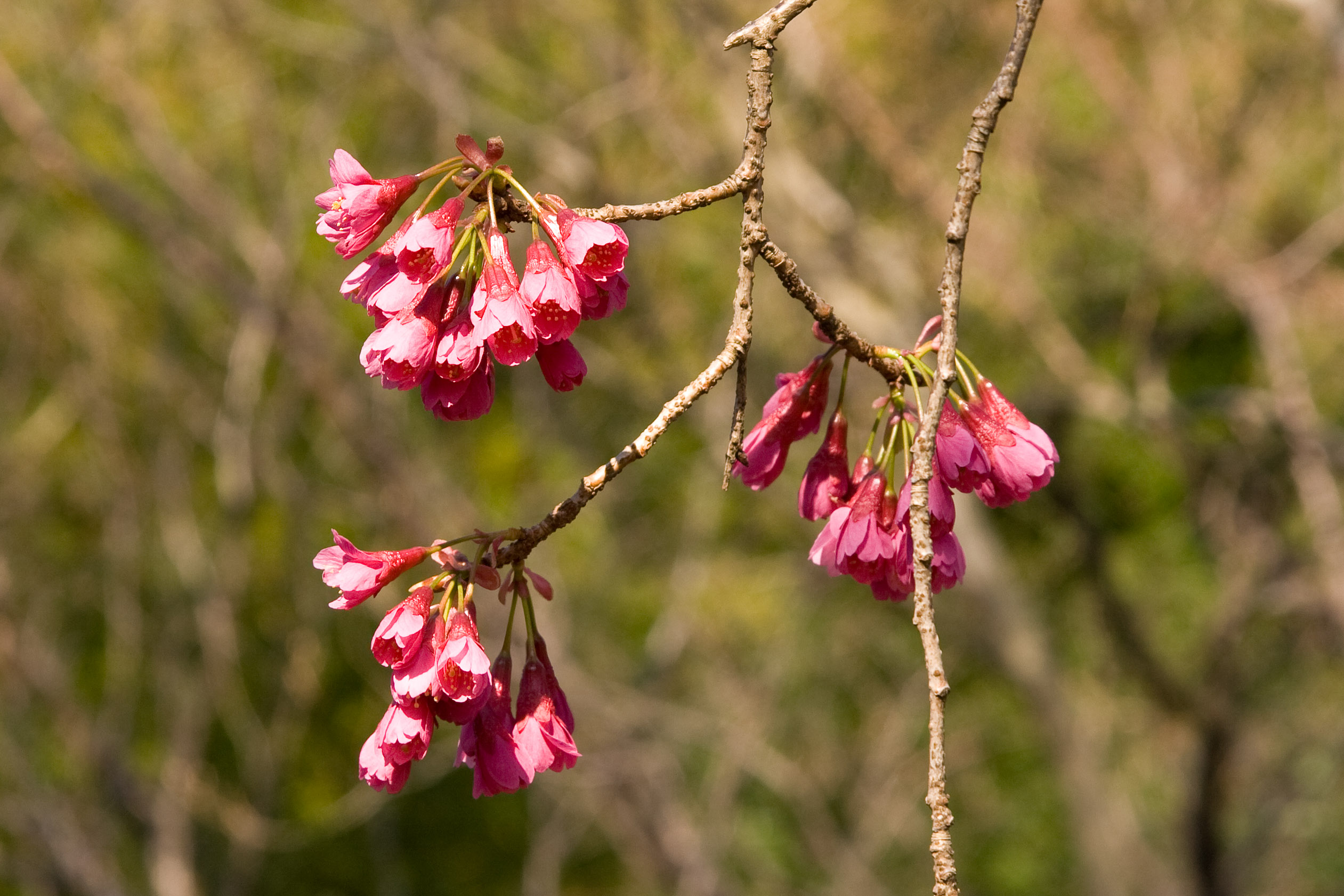 カンヒザクラ (学名:Prunus cerasoides var. canpanulata)